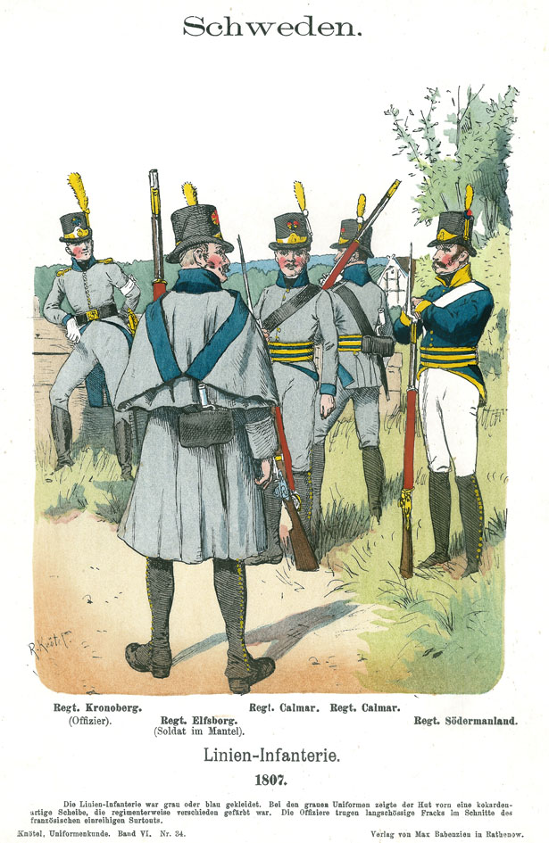 Иллюстрация Рихарда Кнотеля